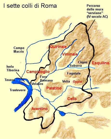 Schizzo rimaneggiato dalla wiki tedesca Schizzo dei sette colli di Roma rielaborato da quello dell'utente Diana della wiki tedesca